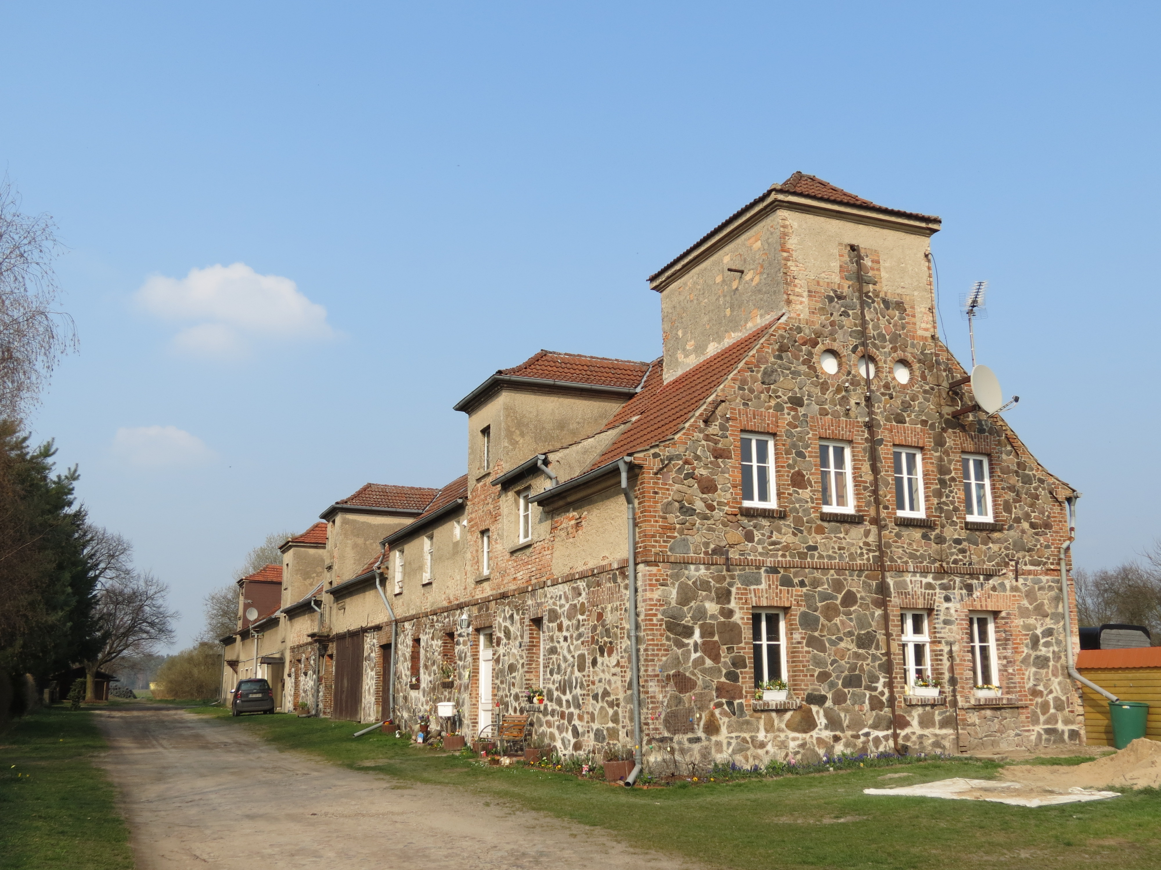 Leeskow, Ortsteil von Jamlitz, Lkr. Dahme-Spreewald, Brandenburg, Deutschland, Gutsgebäude. Dorfstraße 40